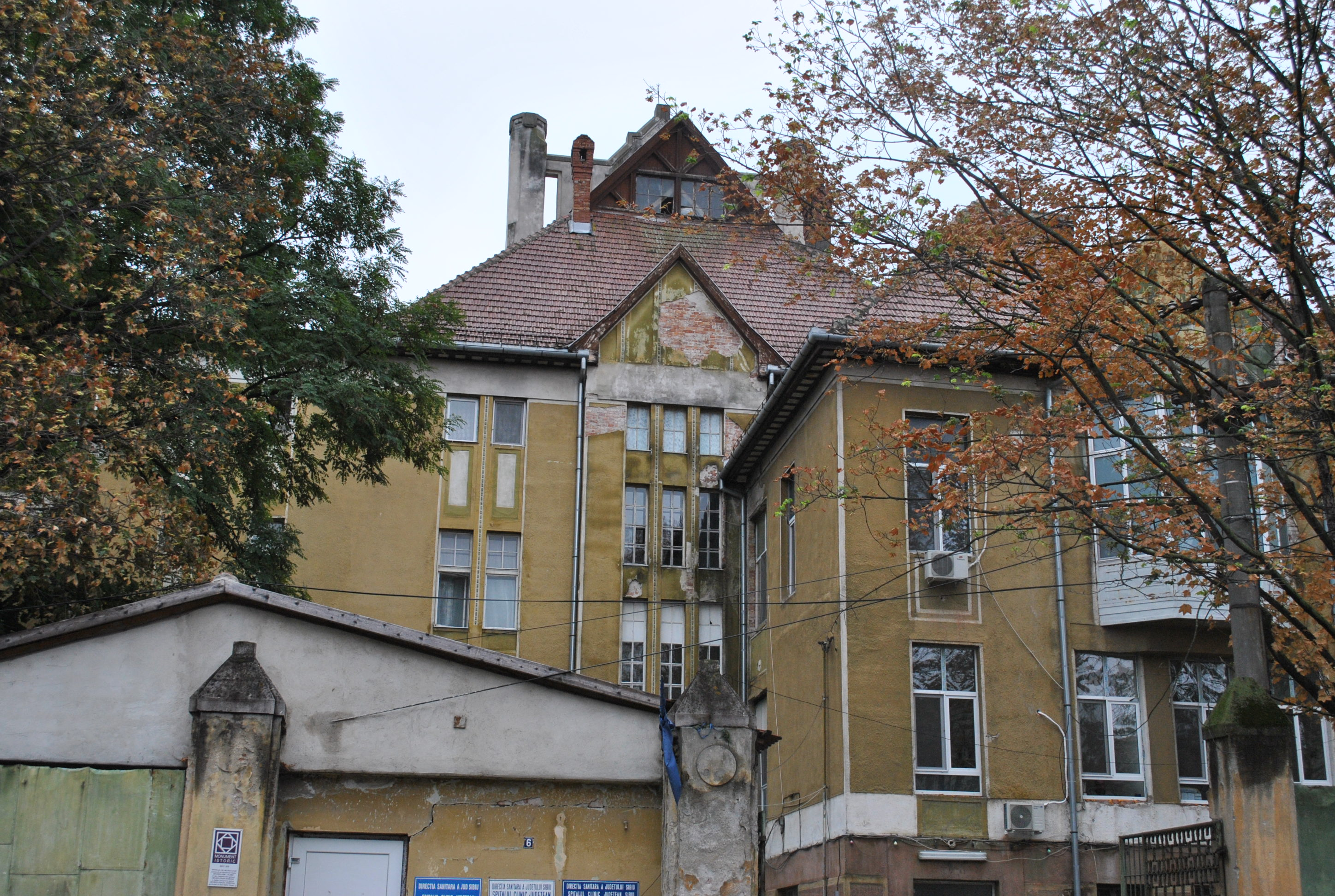 Spitalul de neurologie, construit pe Bastionul Haller, 1552 - 1556 (bastion), înc. sec. XX (spital)